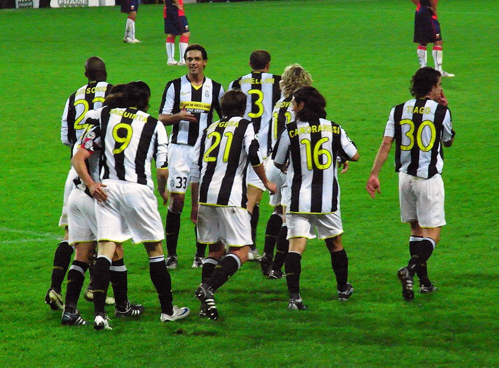 Torino, stadio Olimpico, 13 novembre 2008. Esultanza dei giocatori bianconeri durante Juventus – Genoa (4-1), campionato italiano di Serie A 2008-09.